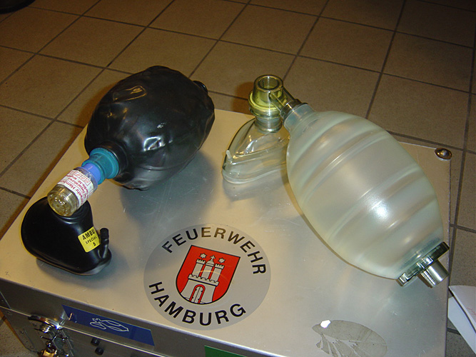 Zwei Beatmungsbeutel: Rechts ein verhältnismäßig neues Modell, links ein älteres von der Fa. Ambu. Jeweils mit einer angeschlossenen Beatmungsmaske. Die Beatmungsbeutel sind im Einsatz bei der Freiwilligen Feuerwehr Hamburg-Groß Flottbek und verlastet auf Löschgruppenfahrzeugen. Selbst aufgenommen am 2004-11-07. Urheber: Wiki-observer